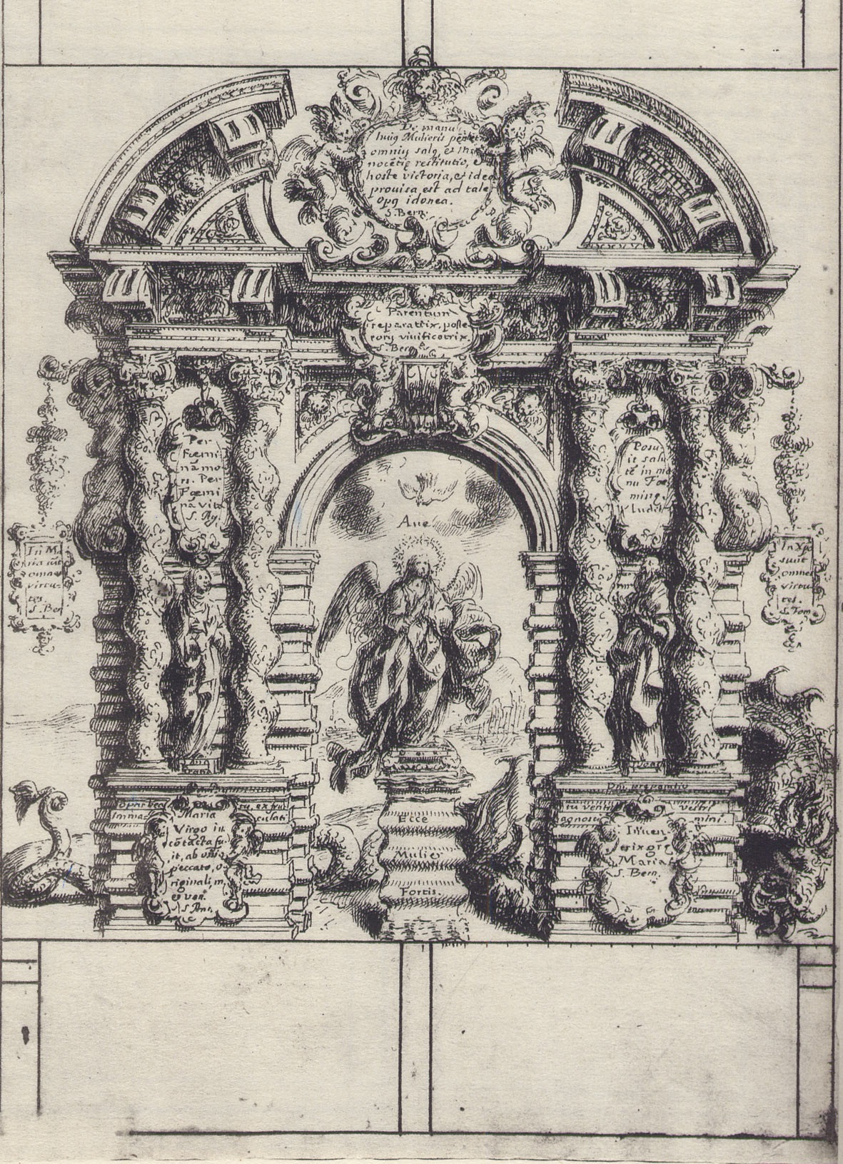 Lam. XI de la obra de Fray Juan Ricci, Lam. XI